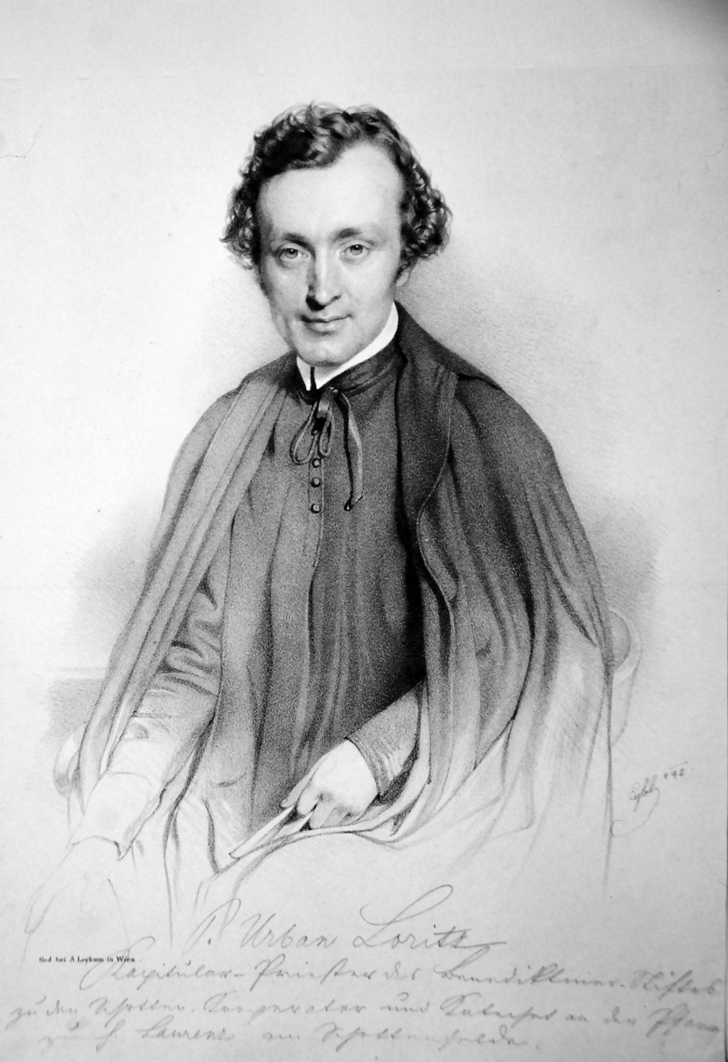 Urban Loritz (1807-1881), um 1840 Benediktiner bei den Schotten in Wien. Lithographie von Franz Eybl, 1842